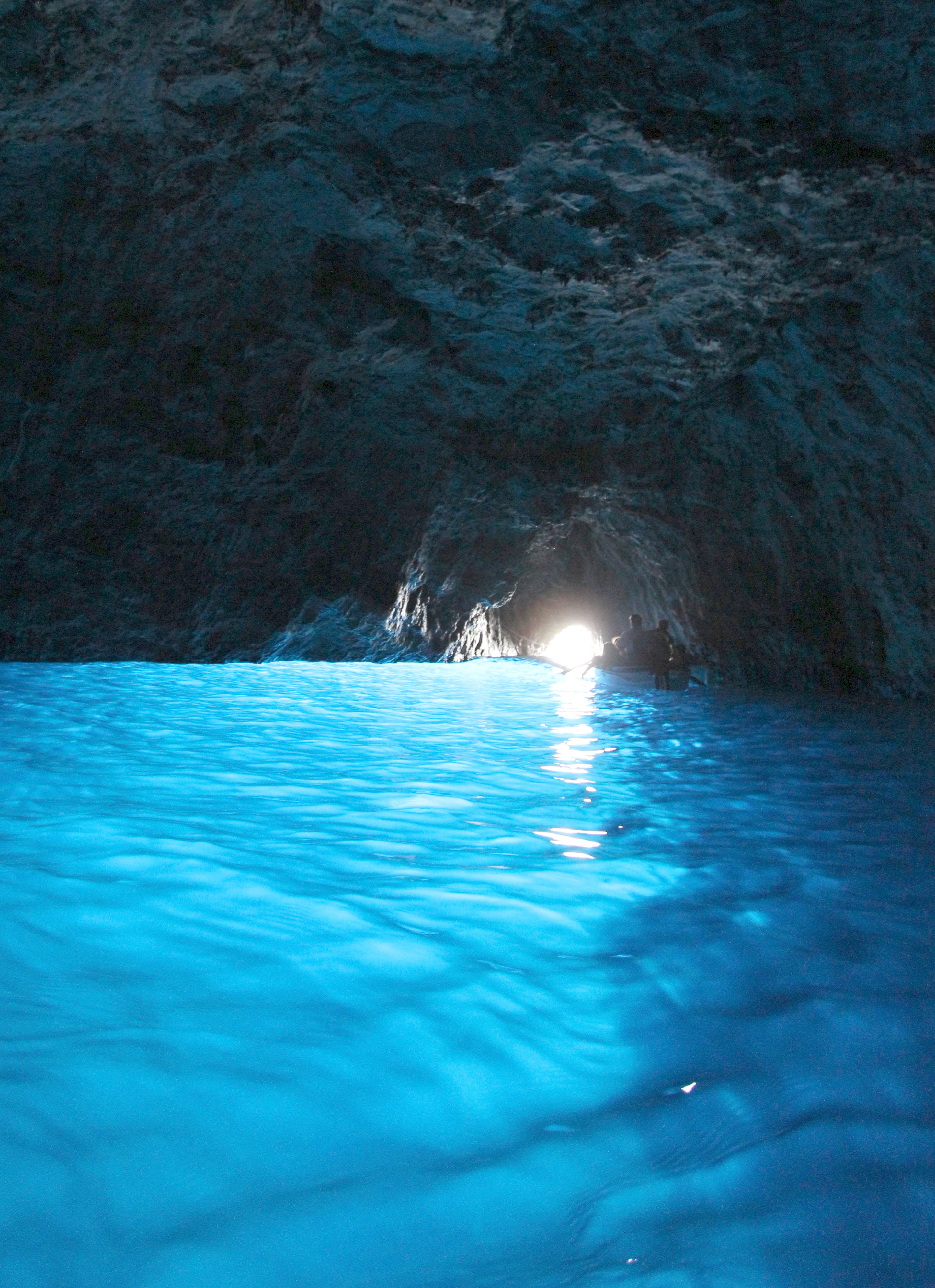 Die Blaue Grotte (italienisch: Grotta Azzurra) ist eine Höhle im Nordwesten der Insel Capri, deren Zugang ein nur knapp 1,5 Meter hohes Felsloch im Meer ist. Aufnahme von 2017.